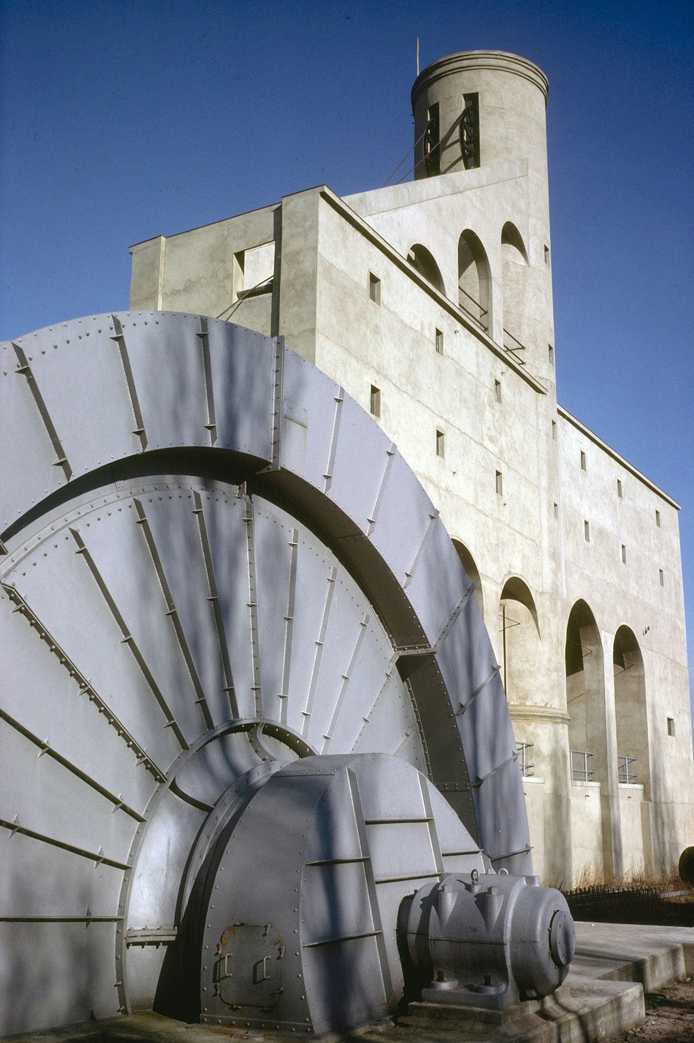 Mijnschacht: Exterieur OVERZICHT